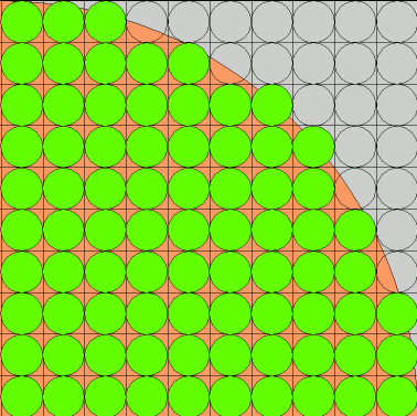 Viertelkreis.gif 1:1 übernommen